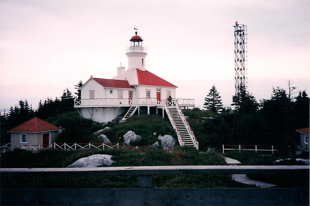 En face de Rivière-du-Loup. Nous avons passé une nuitée en 2003, dans ce phare qui compte 3 chambres (3 couples). Les repas y sont du terroir et superbement bien servis. L'île et ses sentiers y sont ouvertes, sauf les sentiers où il y a nidification des espèces aviaires. On y voit nombres de goélands, mouettes, cormorans, eiders et autres. Leur chant nous accompagne toute la nuit. Inoubliable séjour. Nous vous le recommandons